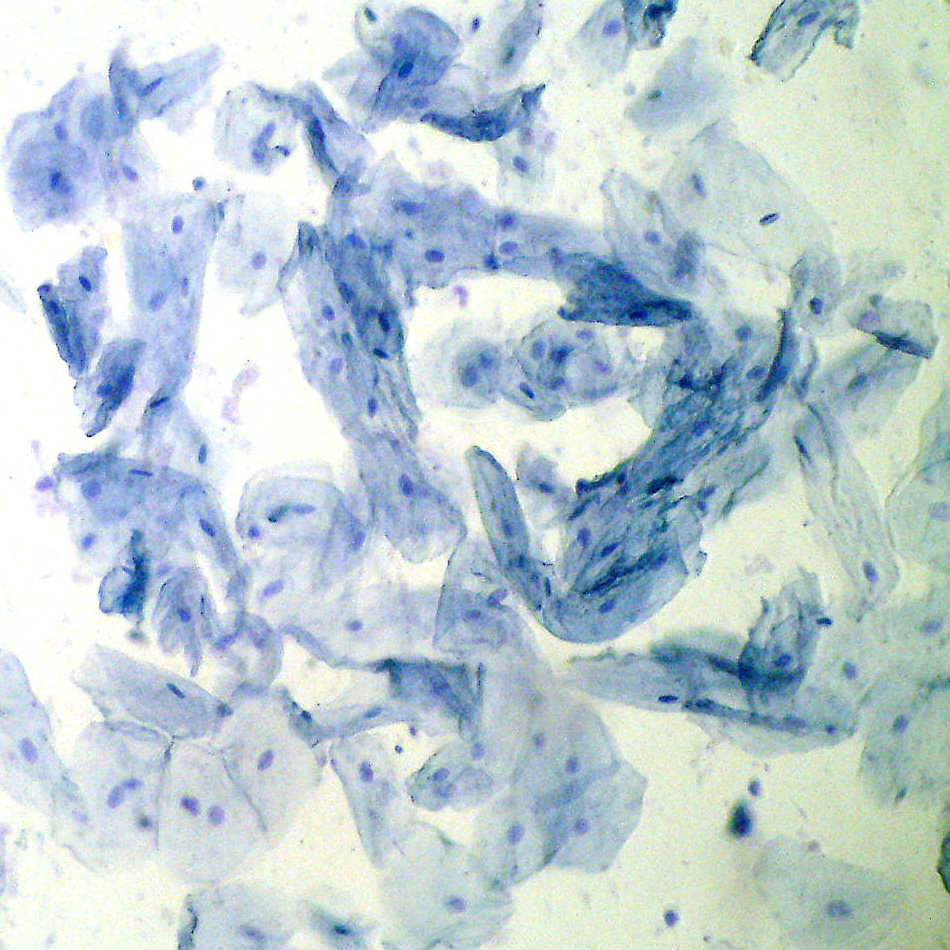 description: Mundschleimhaut des menschen mit Methylenbalu angefärbt author: H. Hoffmeister source: Foto I shot with my Fuji Digicam M603 date: 1.10.2006